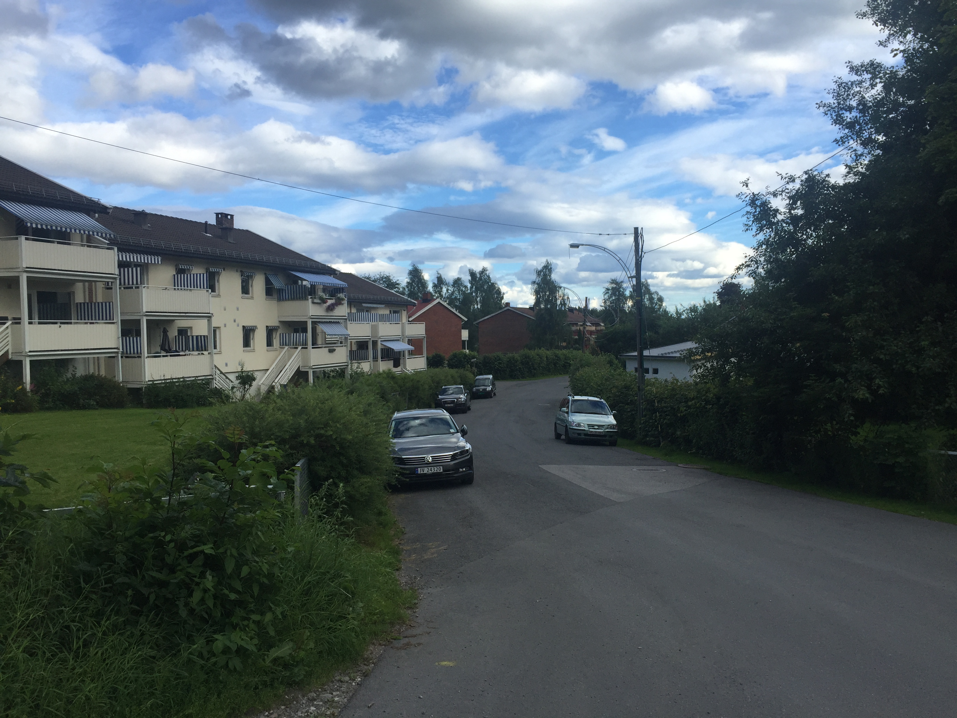 Ekraveien helt ved enden mot Bogstad.